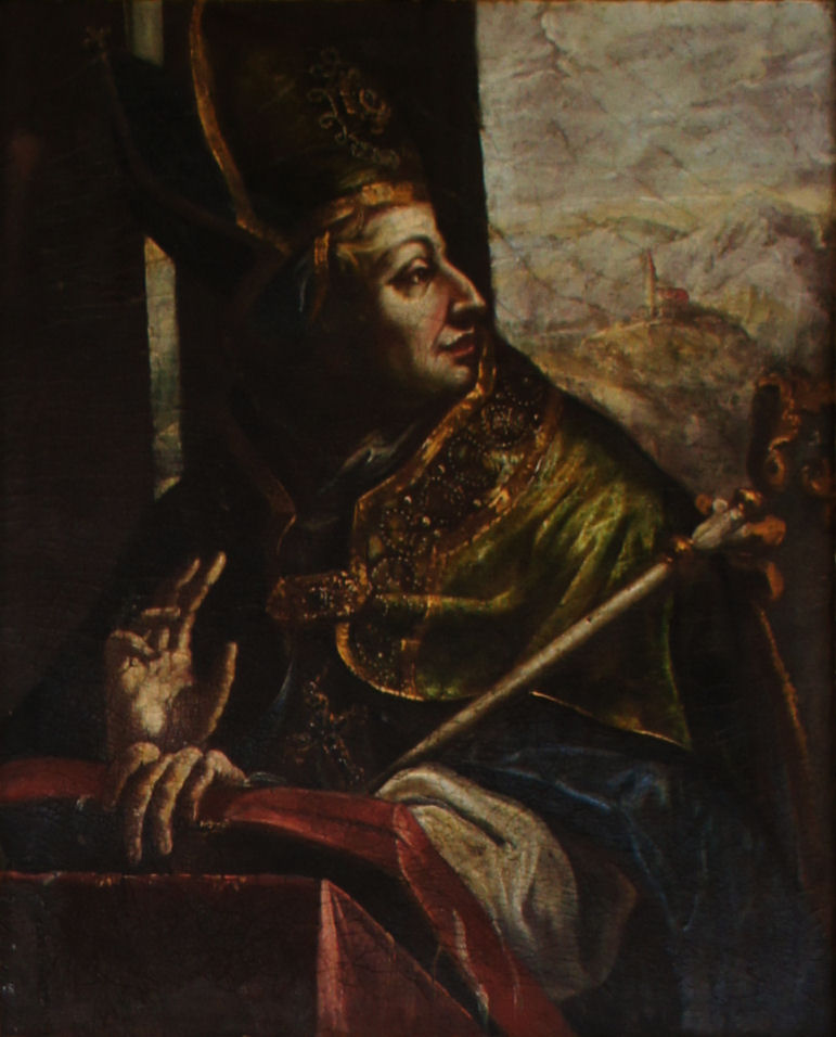 Porträtgemälde von Heinrich I. von Freising, Bischof von Freising, im Fürstengang zwischen Fürstbischöflicher Residenz und Freisinger Dom.